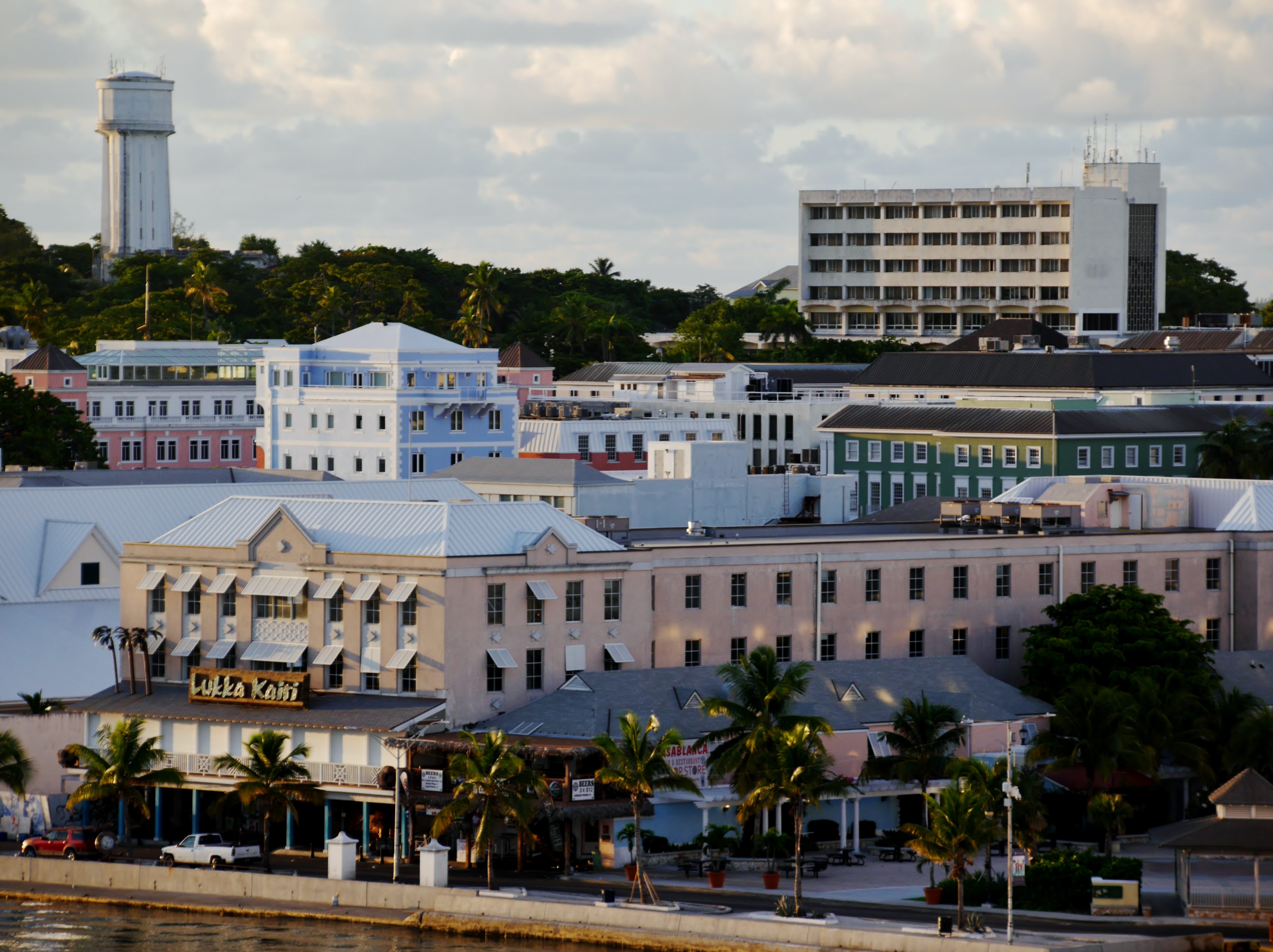 Nassau